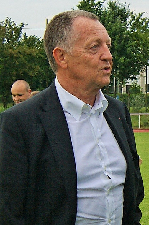 Jean-Michel Aulas, le président de l'Olympique lyonnais le 13 juin 2010 après le match entre l'AS Montigny-le-Bretonneux et l'Olympique lyonnais comptant pour la dernière journée du championnat de France de football féminin 2009-2010.